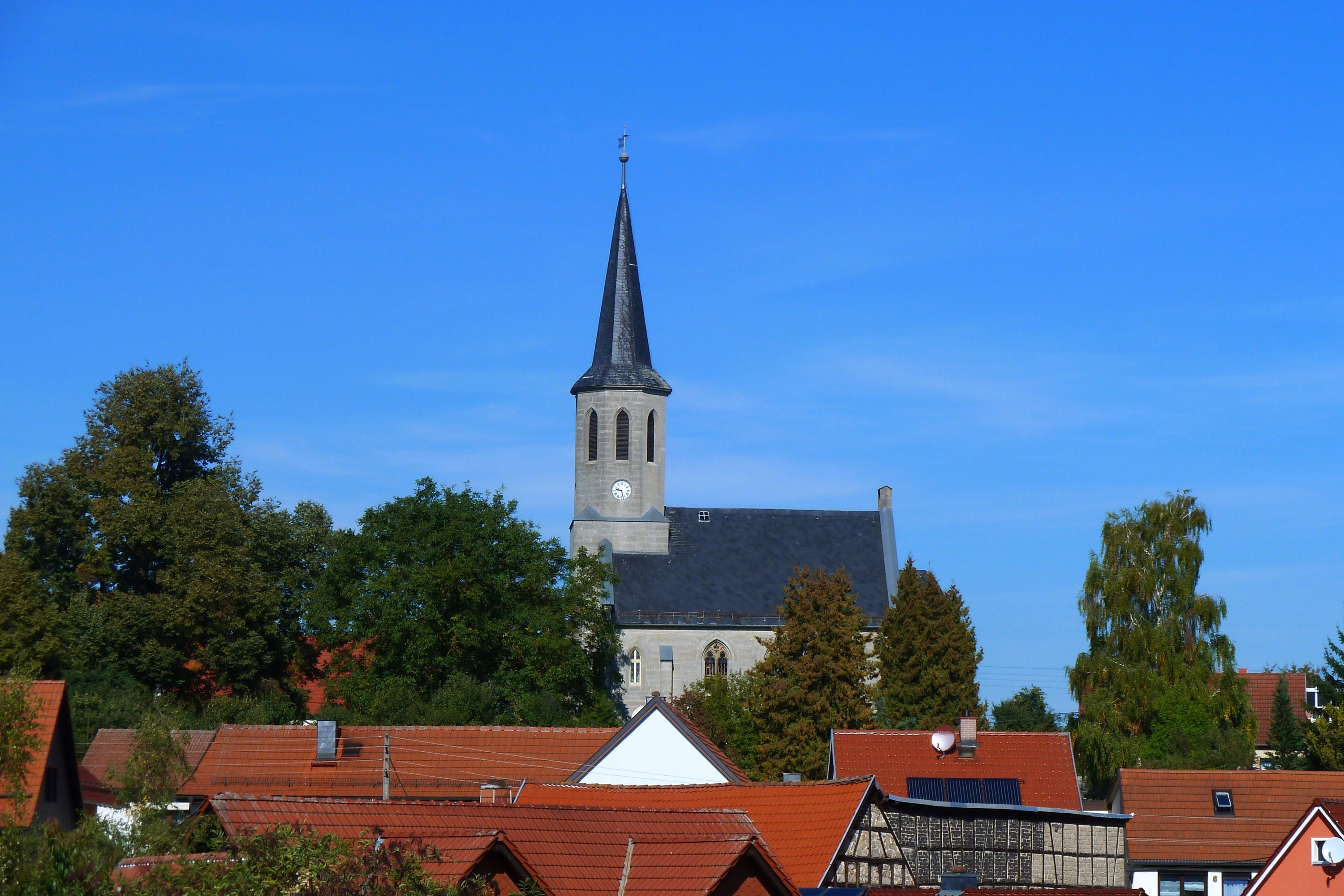 Gemeindekirche von Dreißigacker, einem Ortsteil der Stadt Meiningen